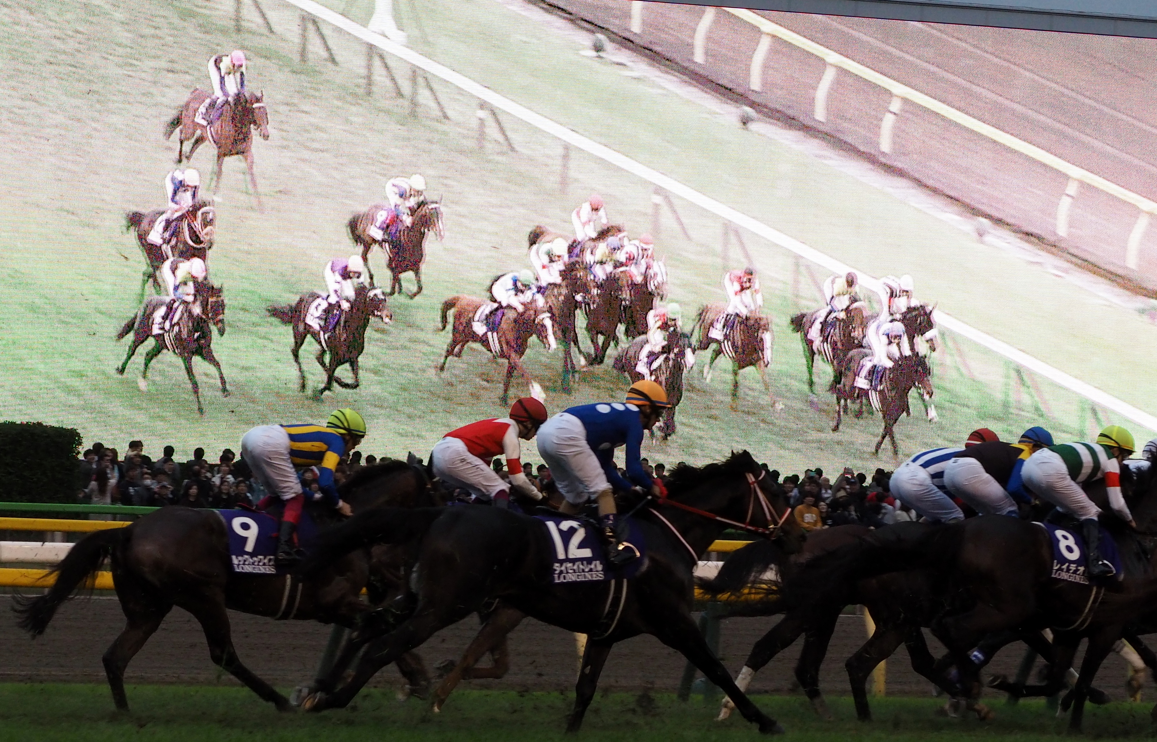 2019年 ジャパンカップ 先行争いが映るターフビジョン